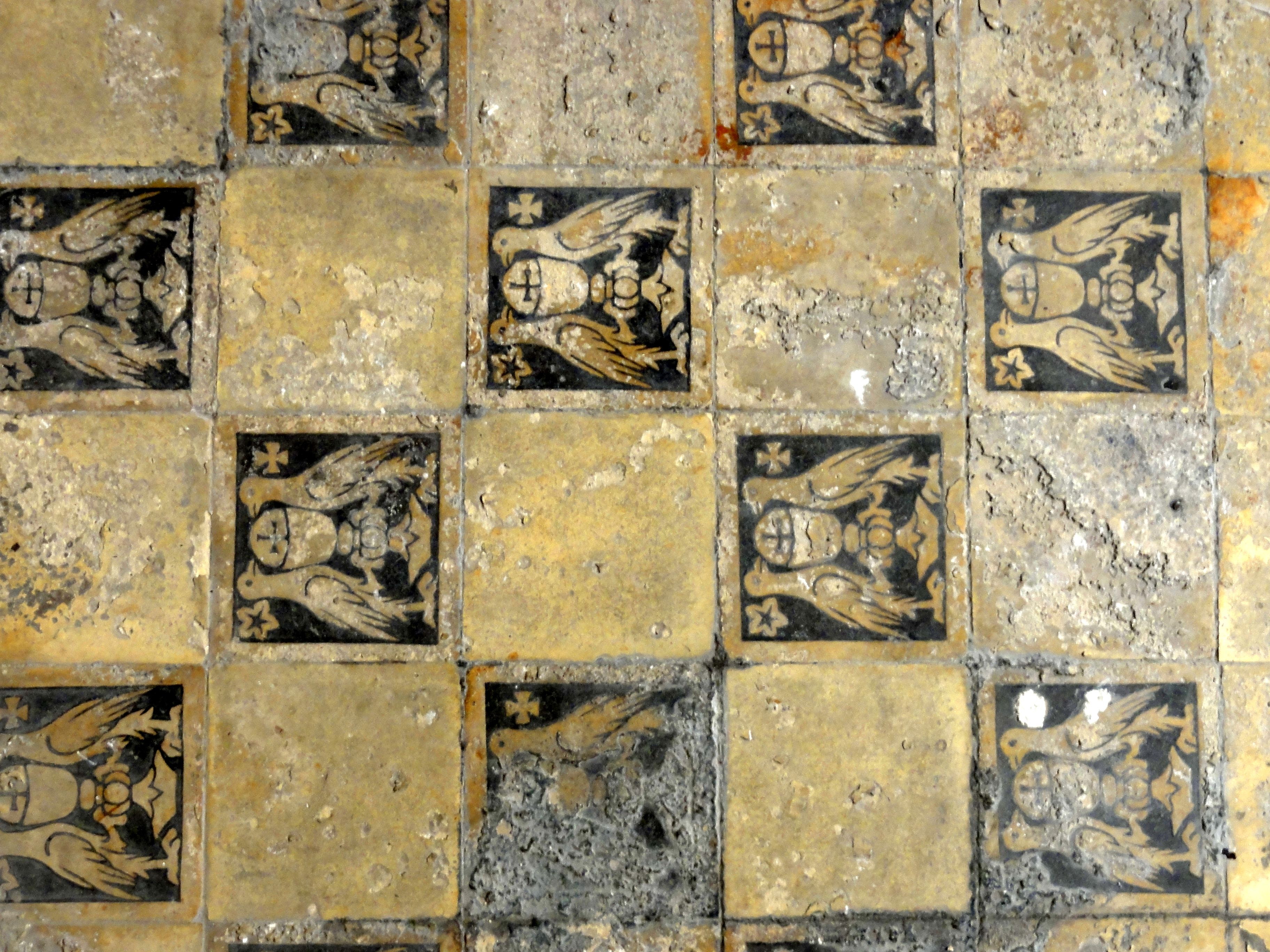 Nef, carrelage du sol autour des fonts baptismaux.